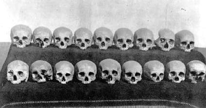 Lobanje celjskih grofov